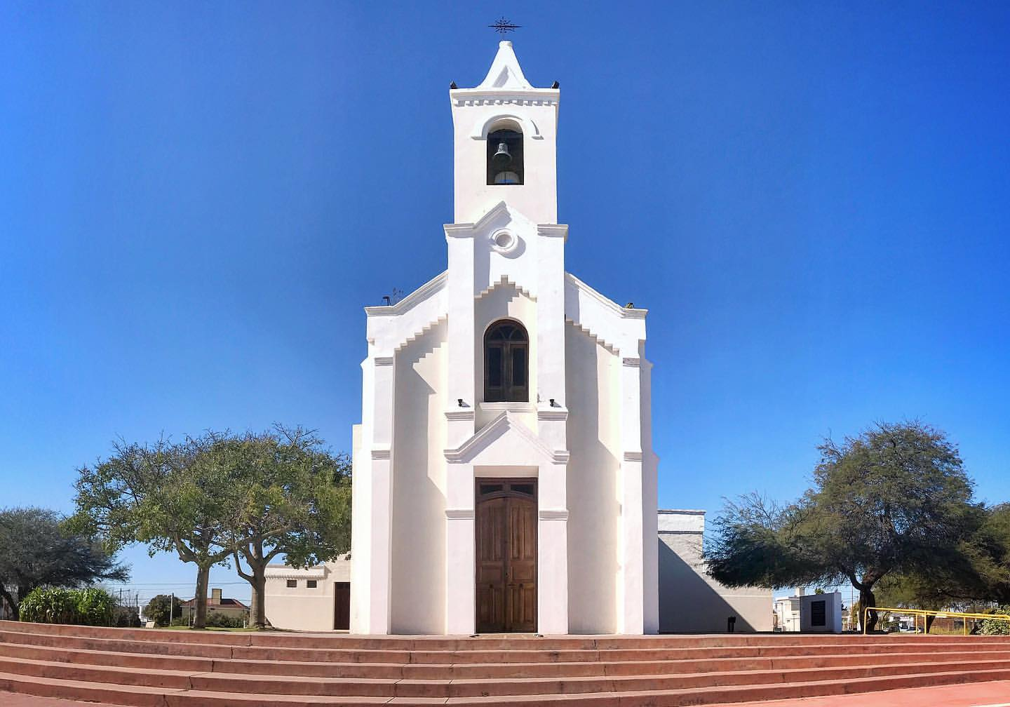 Iglesia San Cayetano, Arroyito, provincia de Córdoba, Argentina.